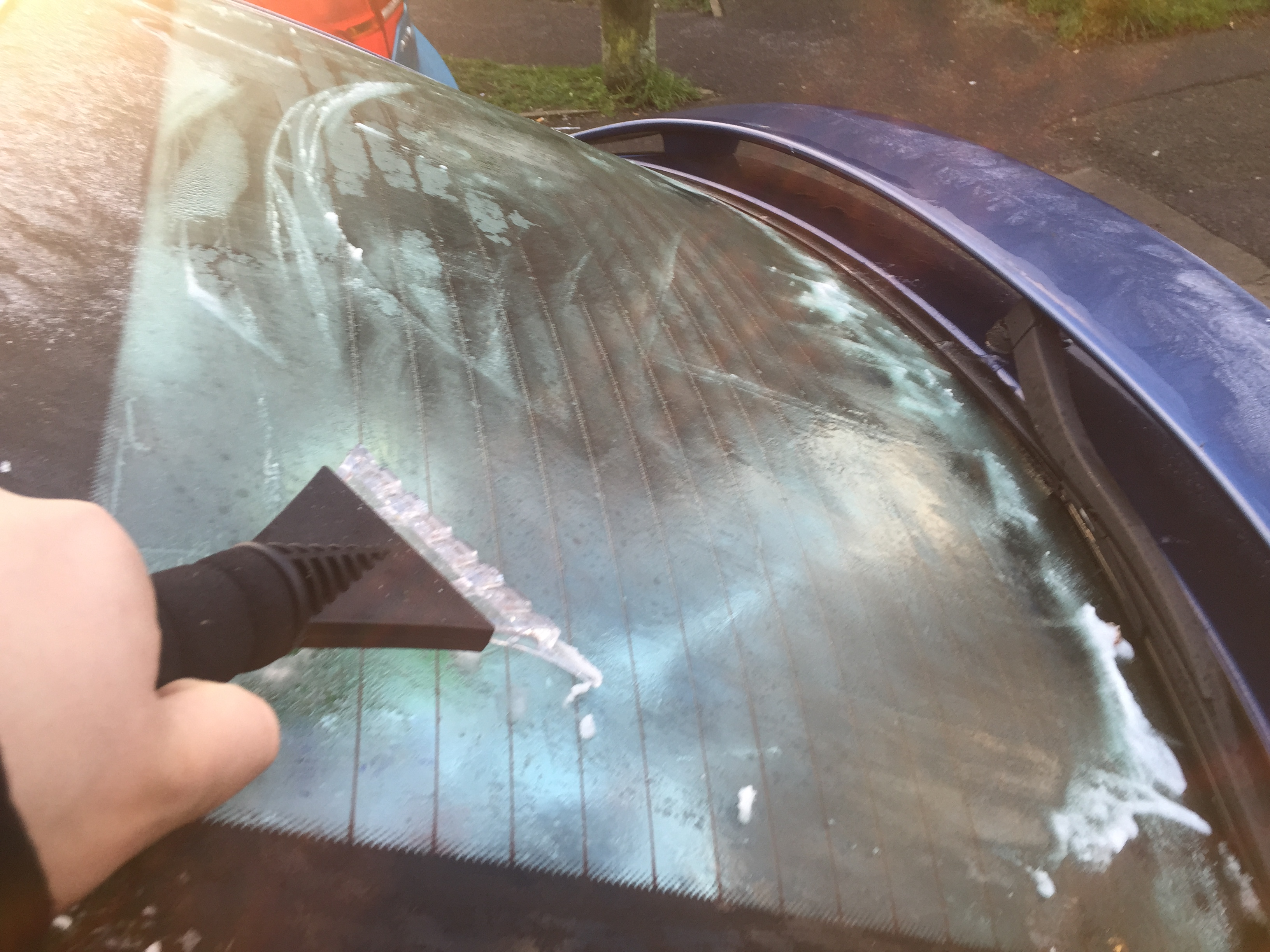 Ledo gremžtukas ant mašinos lango